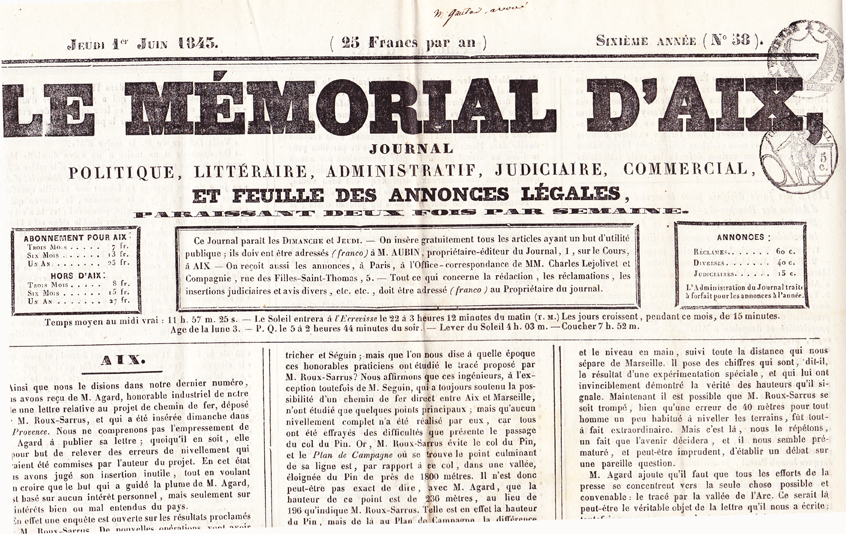 Couverture du n°38 (01 juin 1843) du Mémorial d'Aix (détail)